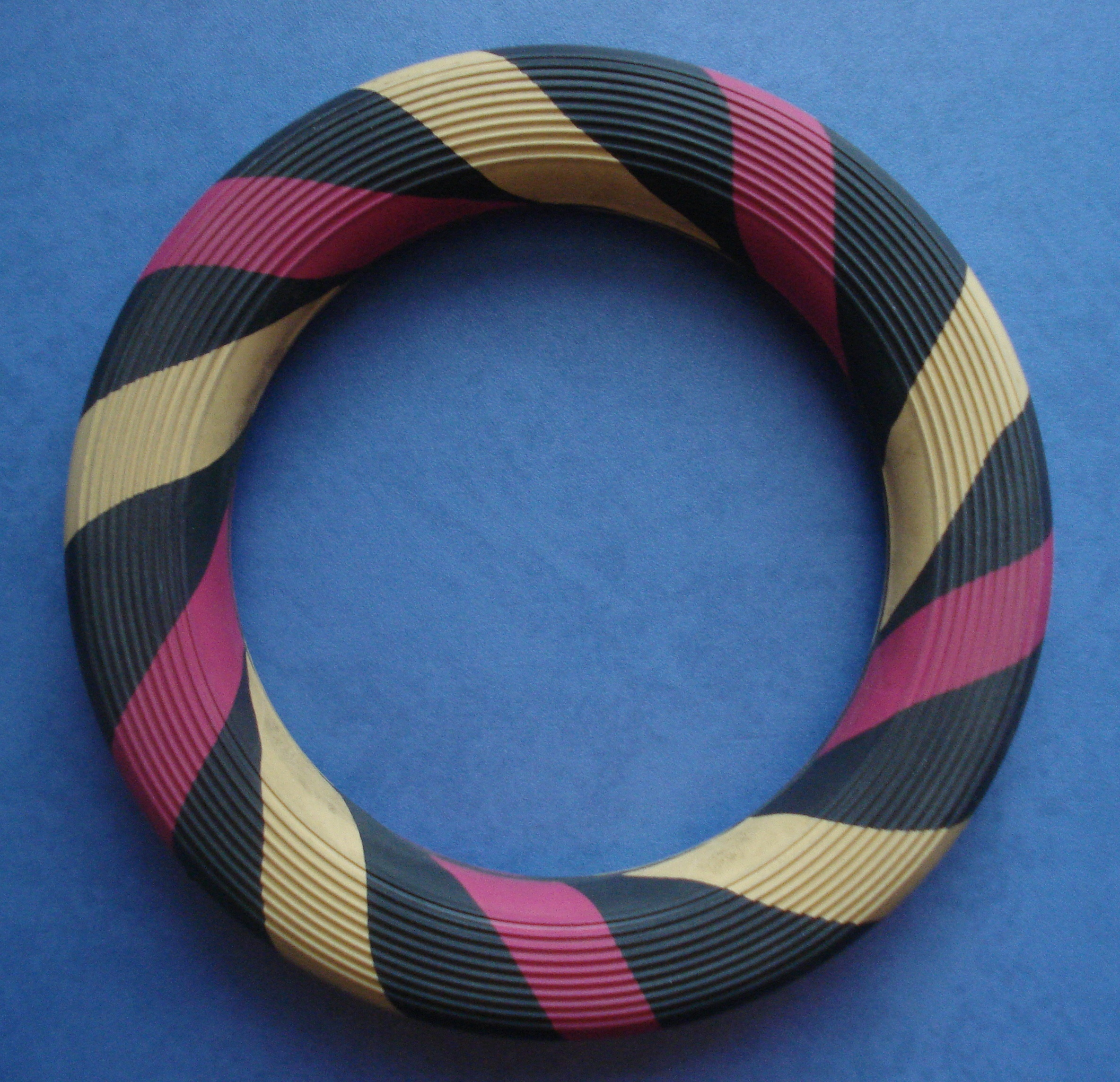 фатаздымак гумавага кальца для спартыўнай гульні рынга, аўтар: Андрэй Конан.